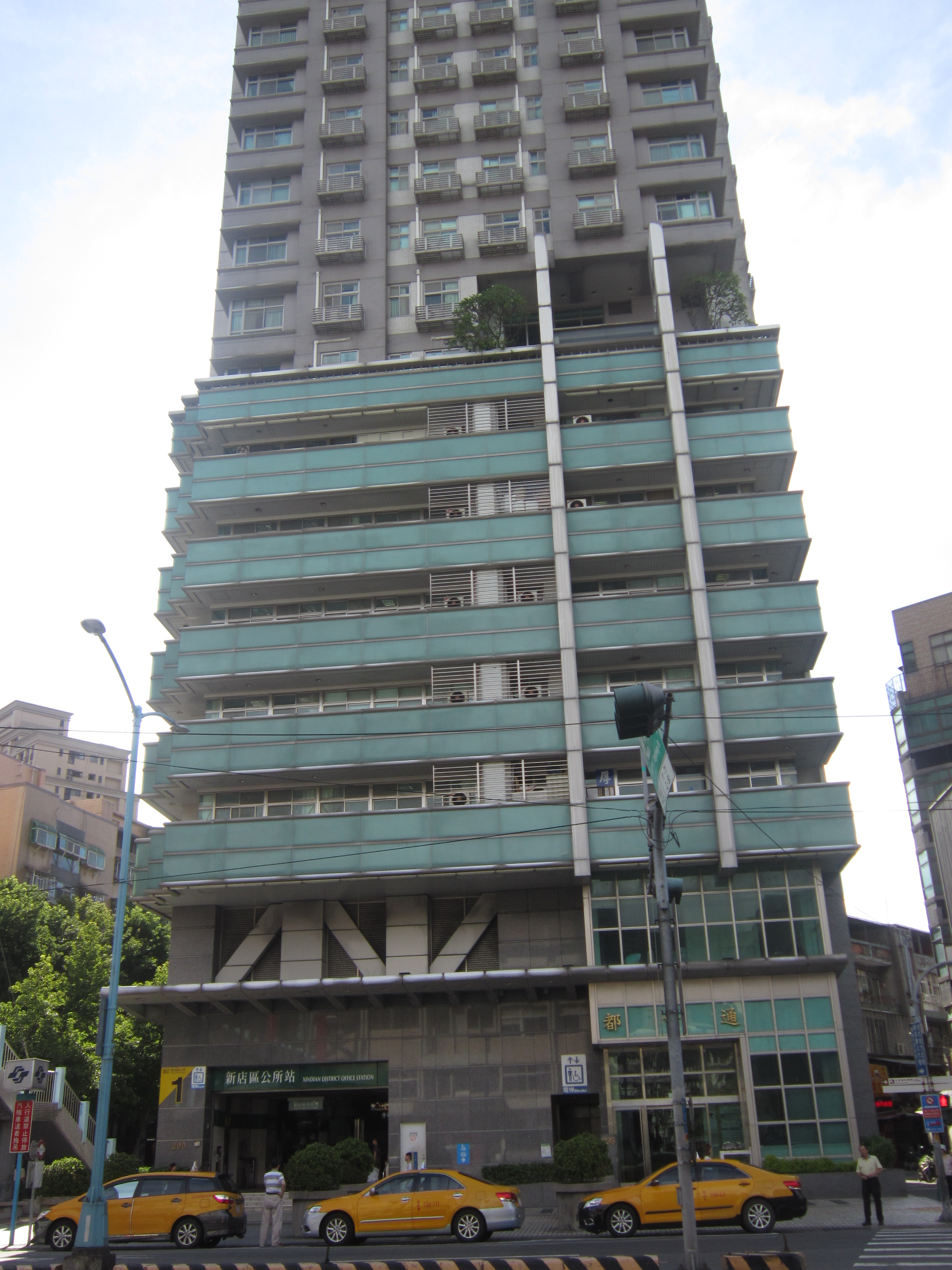 捷運新店區公所站1號出口，位於一幢共構大樓的一樓。